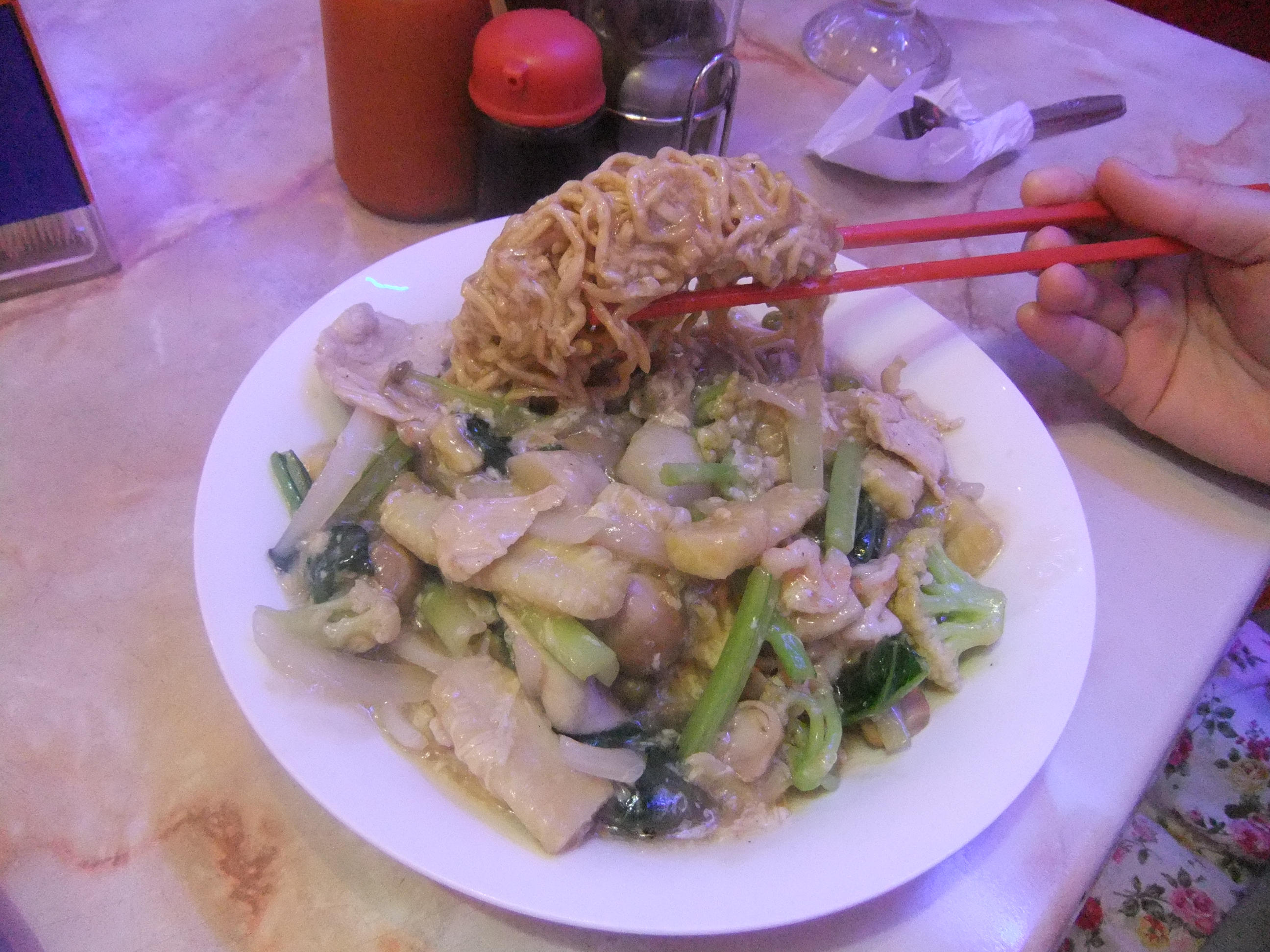 I Fu Mie